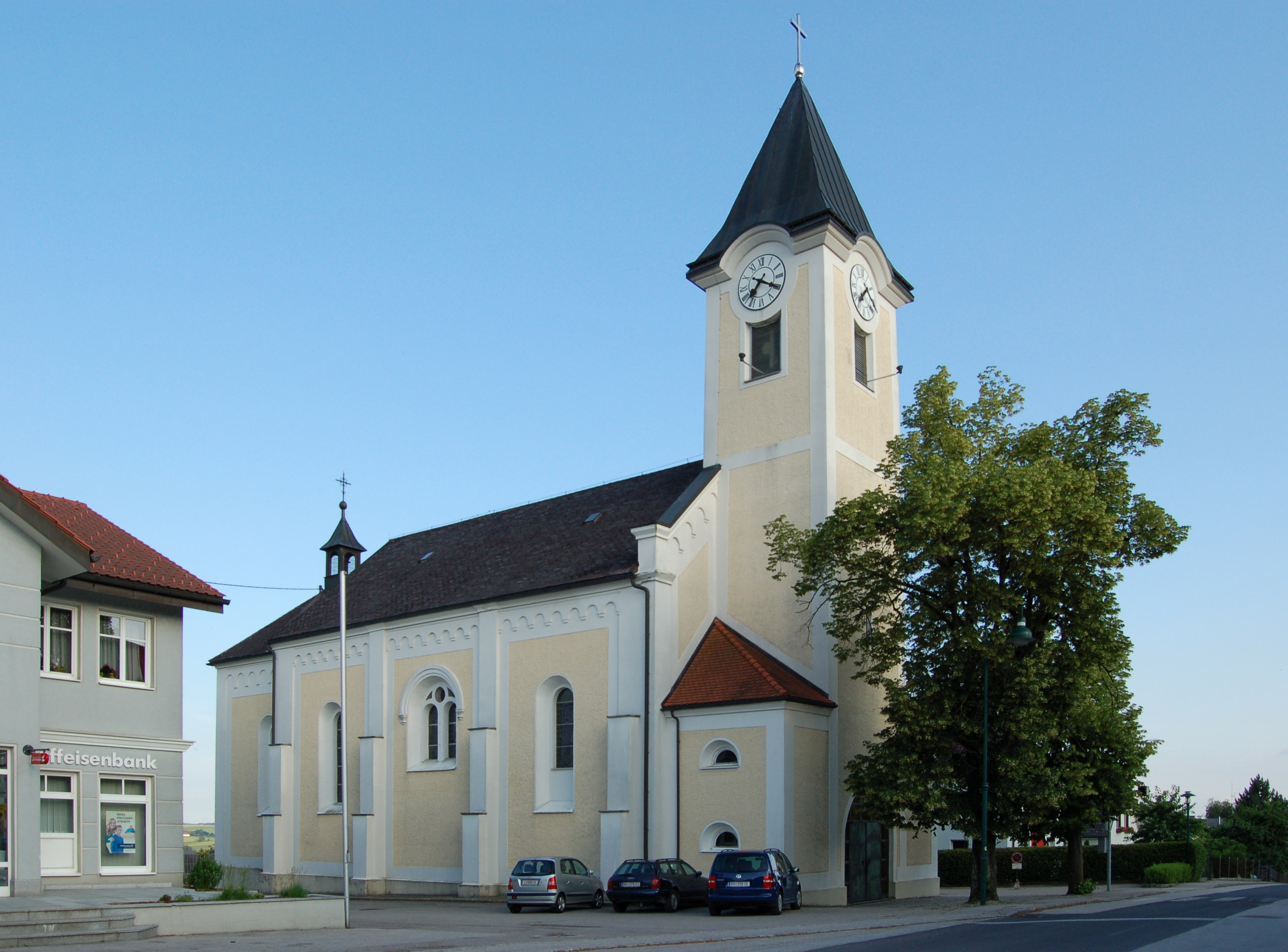 Die denkmalgeschützte Pfarrkirche in Arnreit, Bezirk Rohrbach (Oberösterreich).